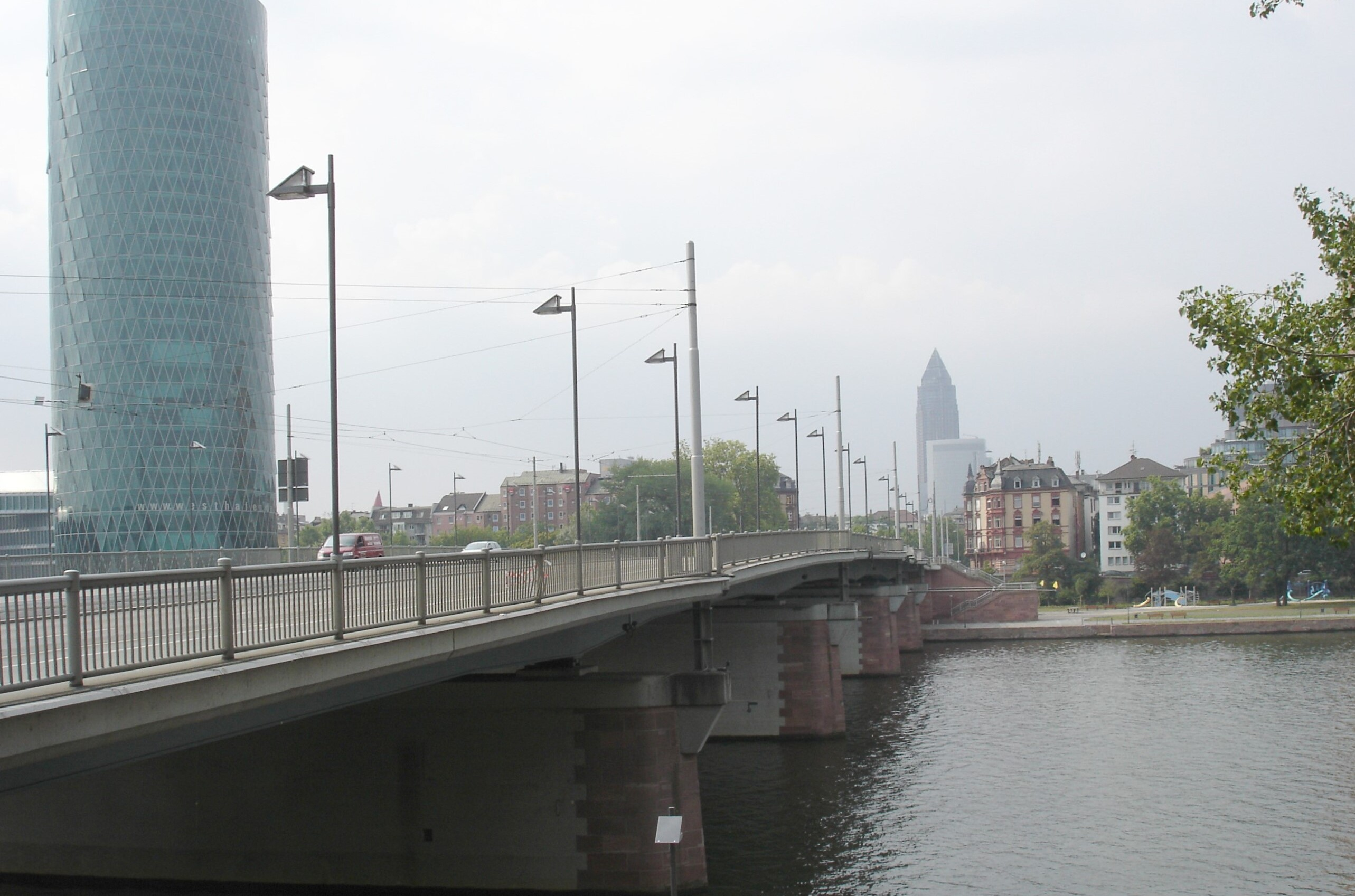 Friedensbrücke vom Südufer (Ffm-Sachsenhausen) Blickrichtung Hauptbahnhof-Messe